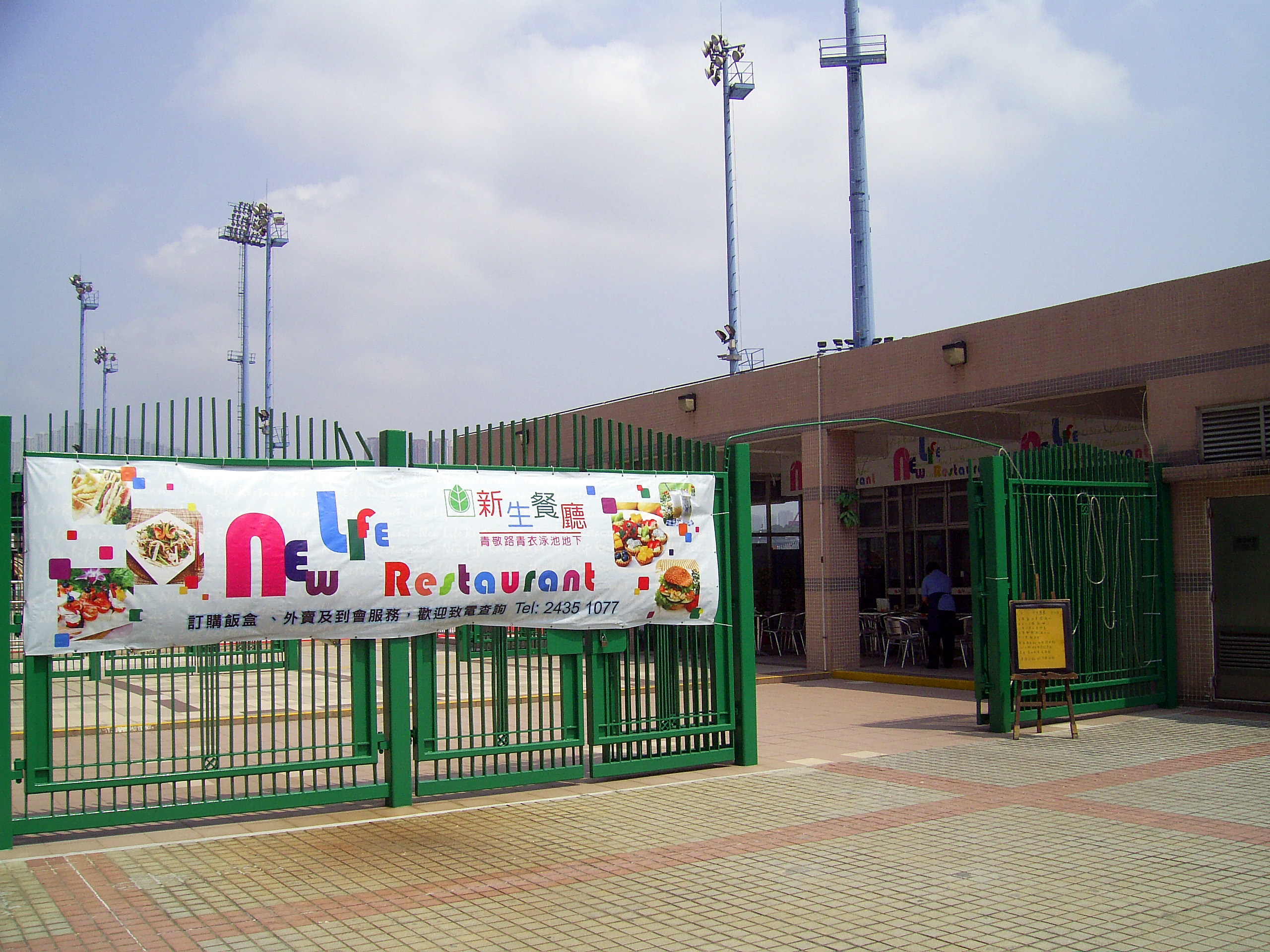 中文（香港）: 青衣新生餐廳